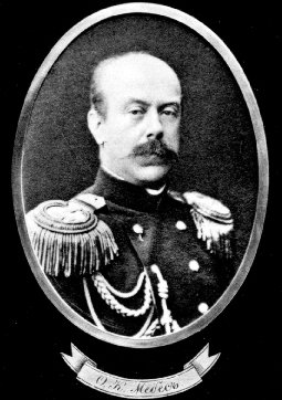 Полковник Мебес, Отто Карлович, убит на 12 (24) октомври 1877 г. при Телиш.